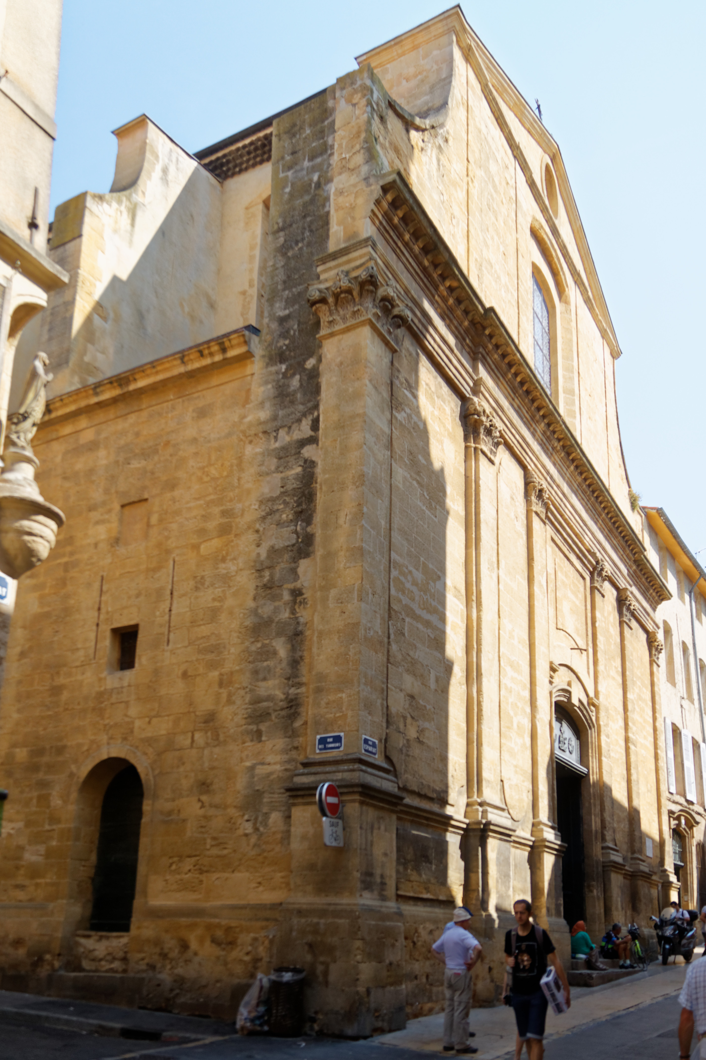 Heilig-Geist-Kirche in Aix-en-Provence